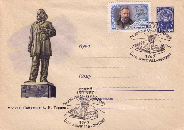 Конверт первого дня к 150-летию А. Герцена